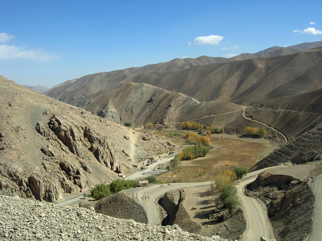 Road between Kabul and Bamiyan, Afghanistan